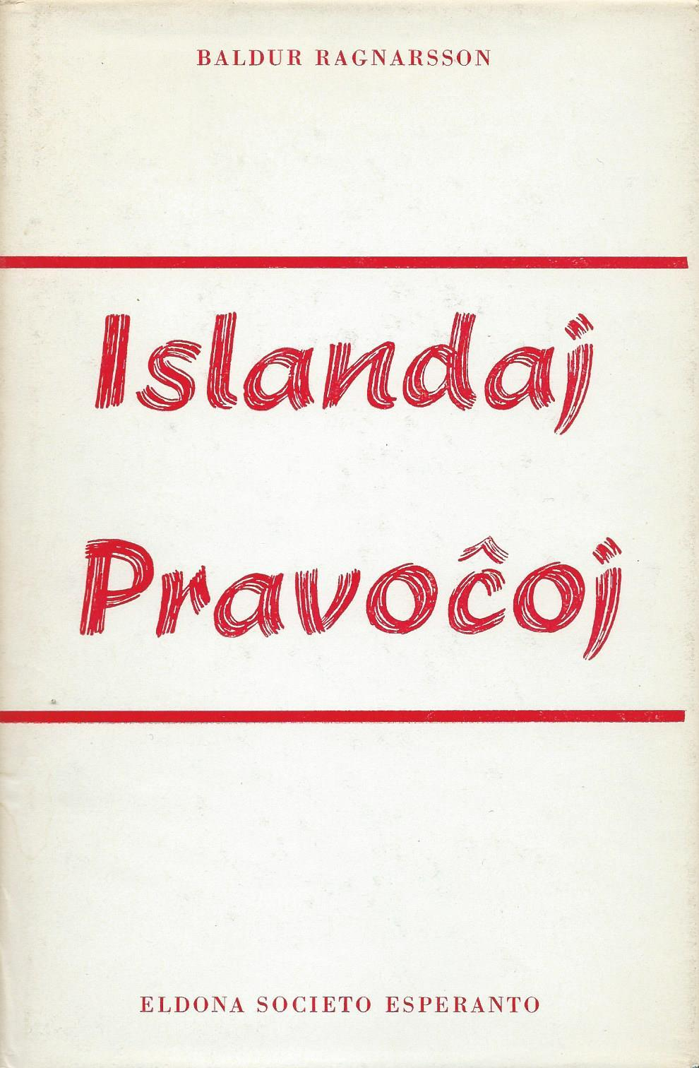 librokovrilo de "Islandaj Pravoĉoj", 1964